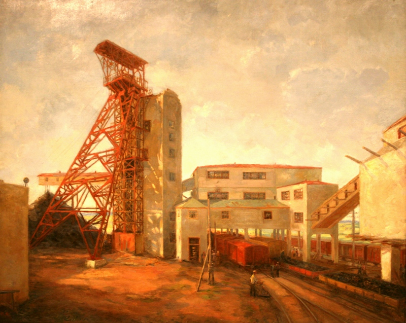 Картина «Шахта №6. Артемуголь»